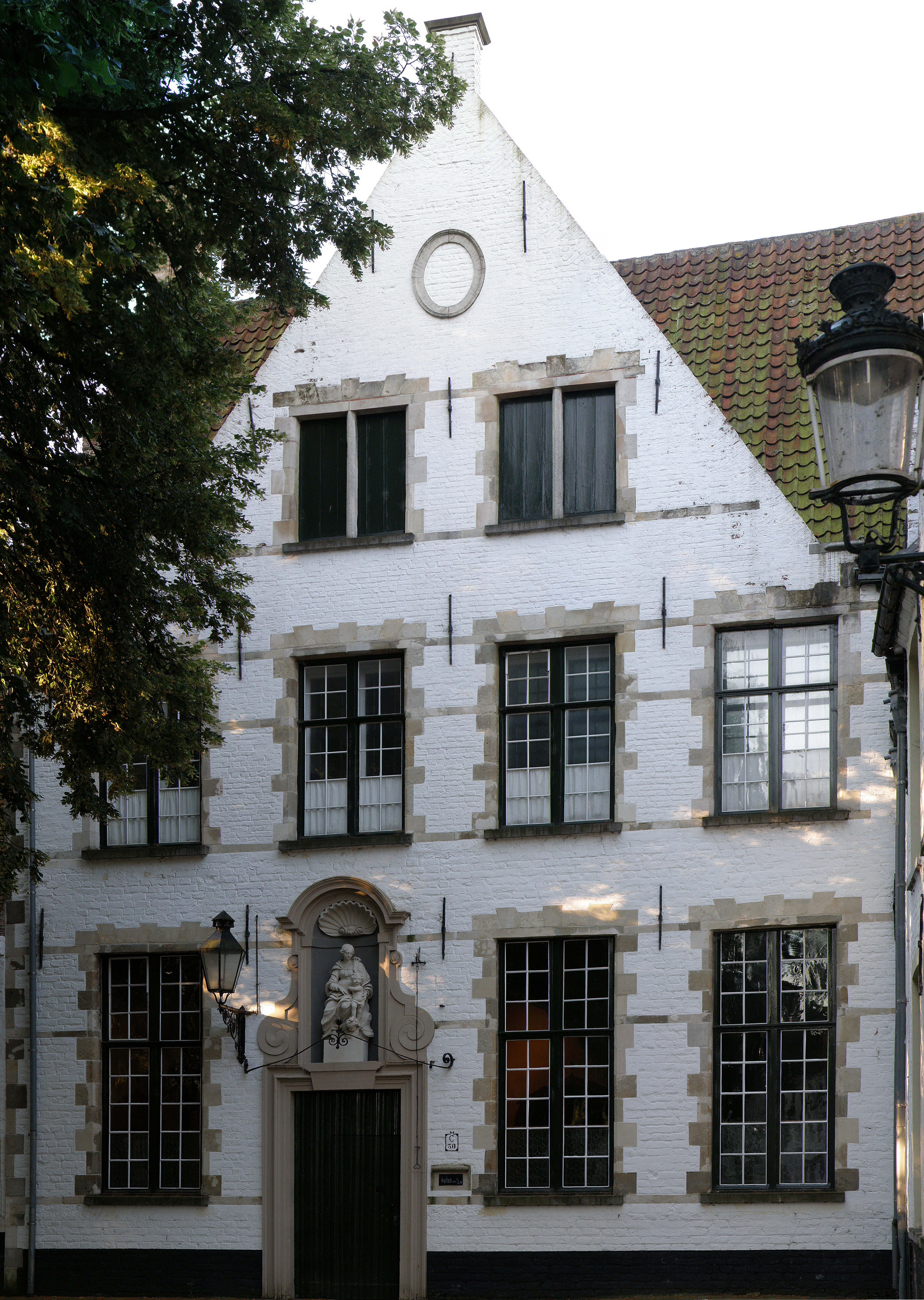 Brugge, Begijnhof. Woning van de grootjuffrouw of kapittelhuis (omvat infirmerie en huiskapel).